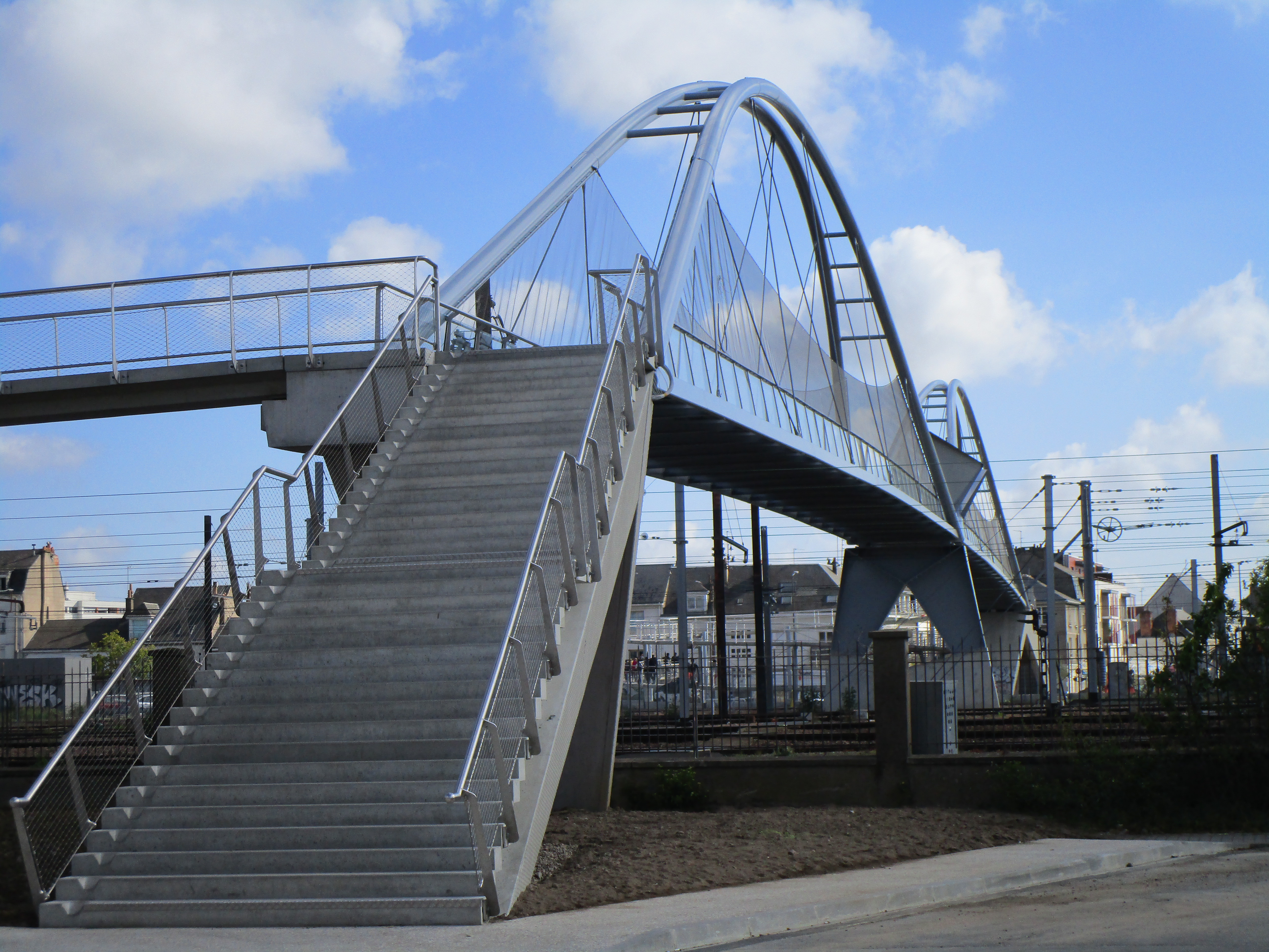 Le passerelle Fournier de Tours, vue depuis le quartier Sanitas.